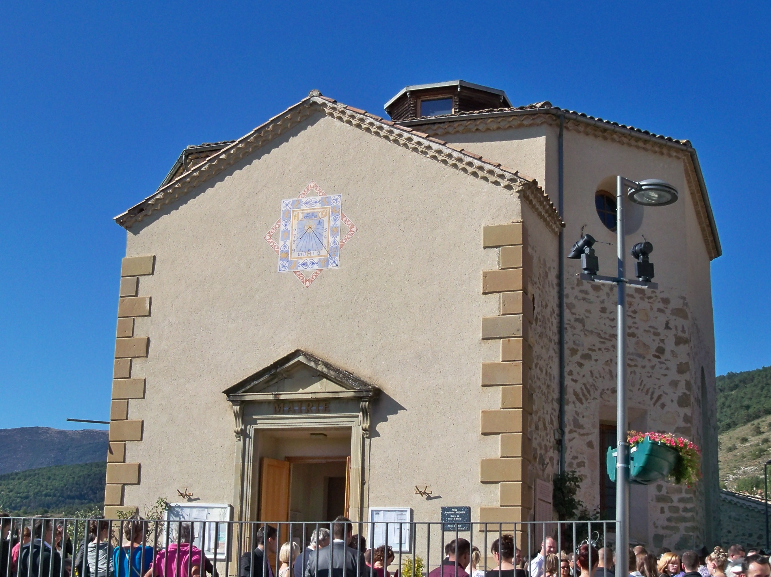 Mairie de Rosans